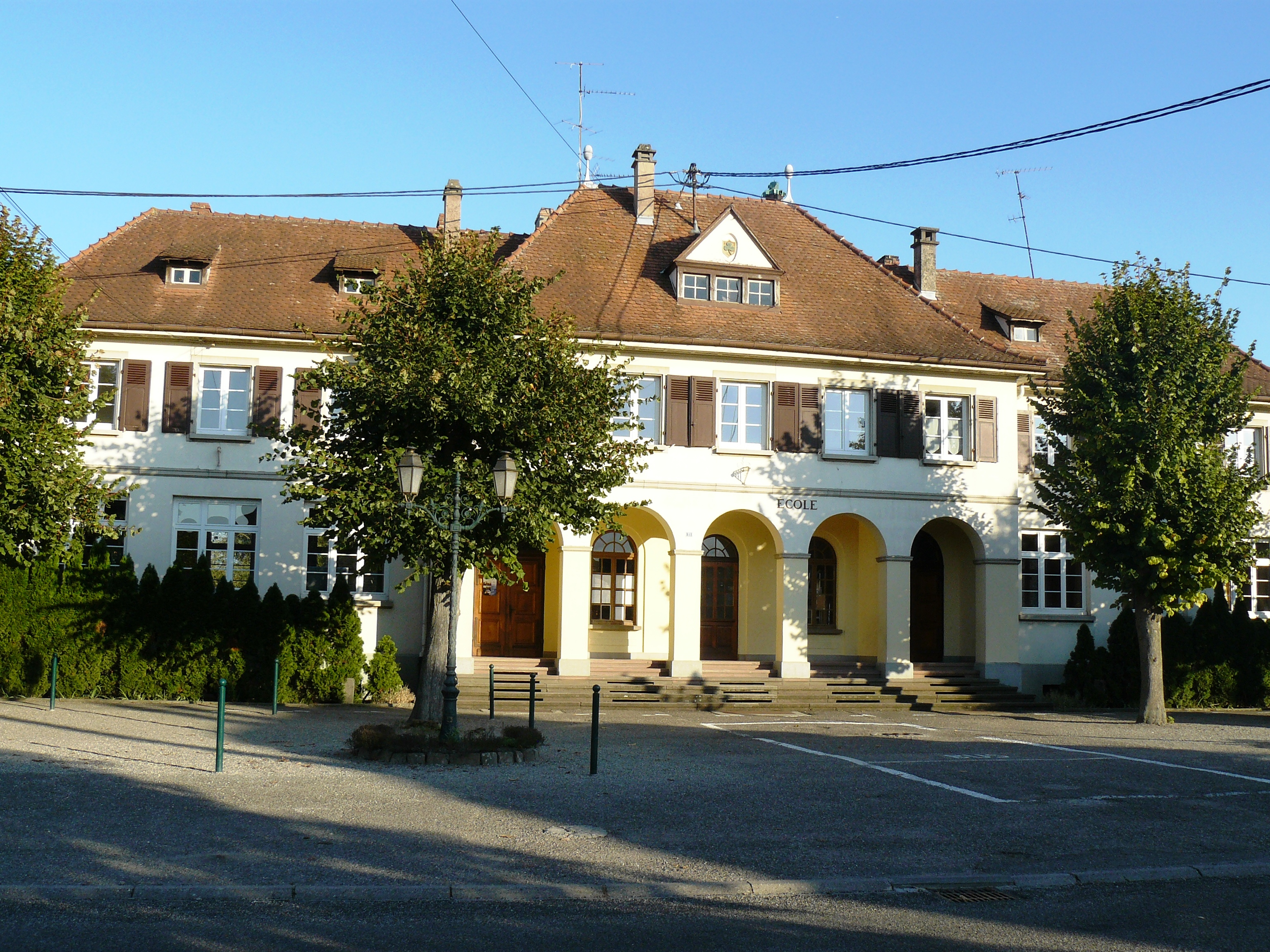 Mairie-école de Saassenheim